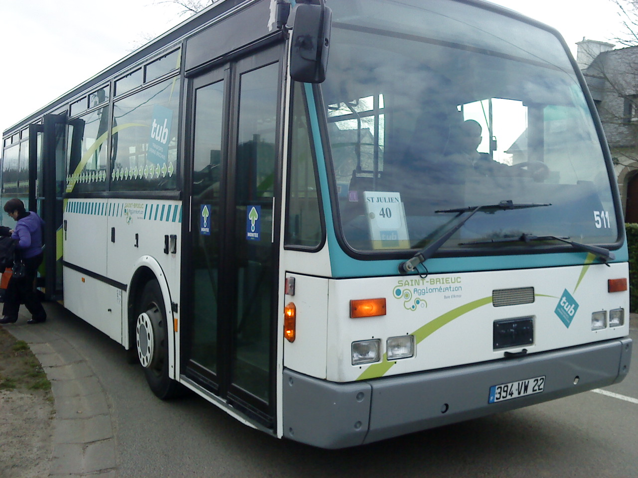 VanHool A-600/2 N°511 TUB